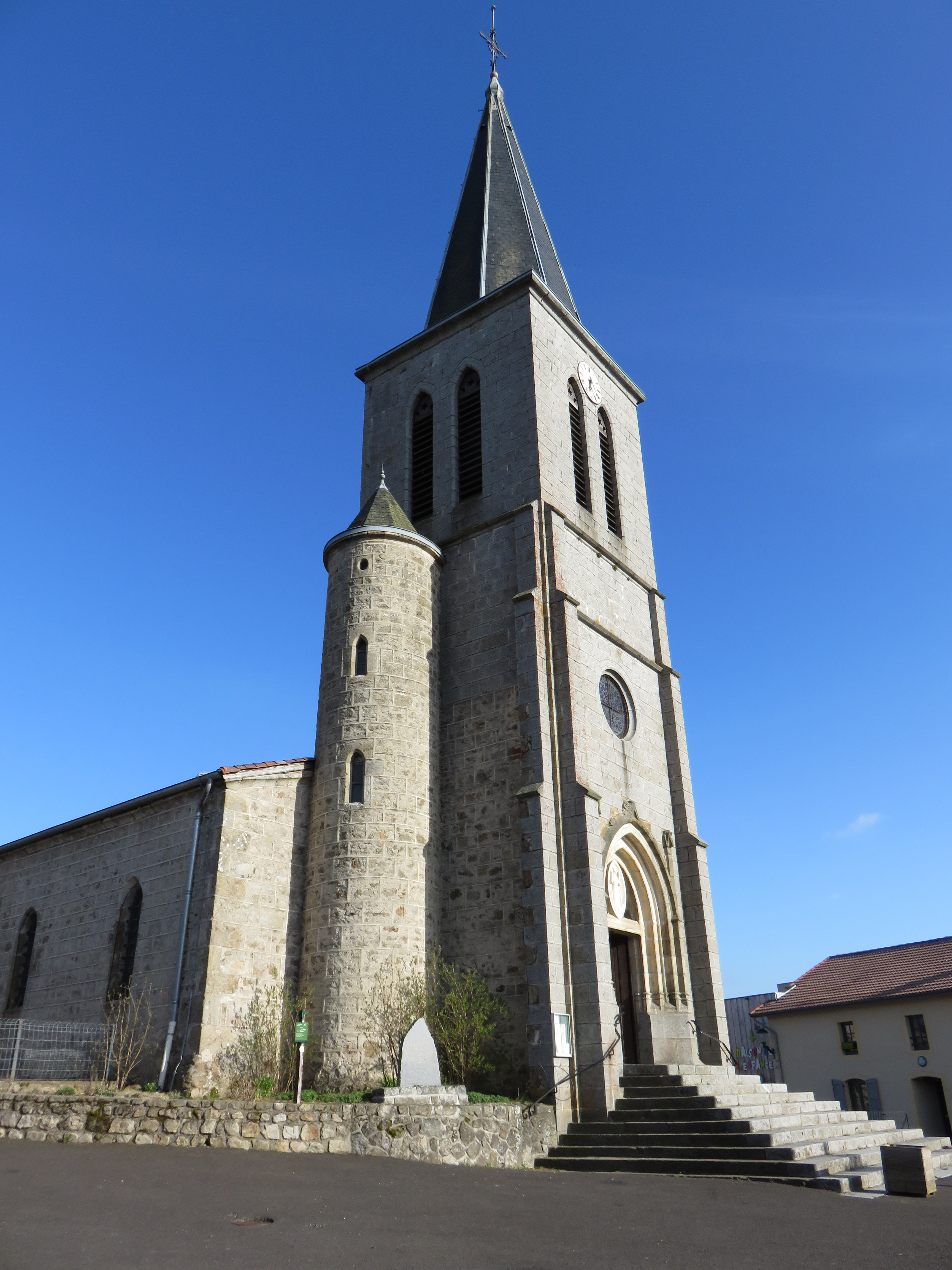 Église Saint-Hippolyte d'Églisolles (Puy-de-Dôme, France).